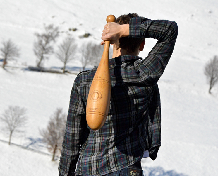 Turnkeulen annon 2013